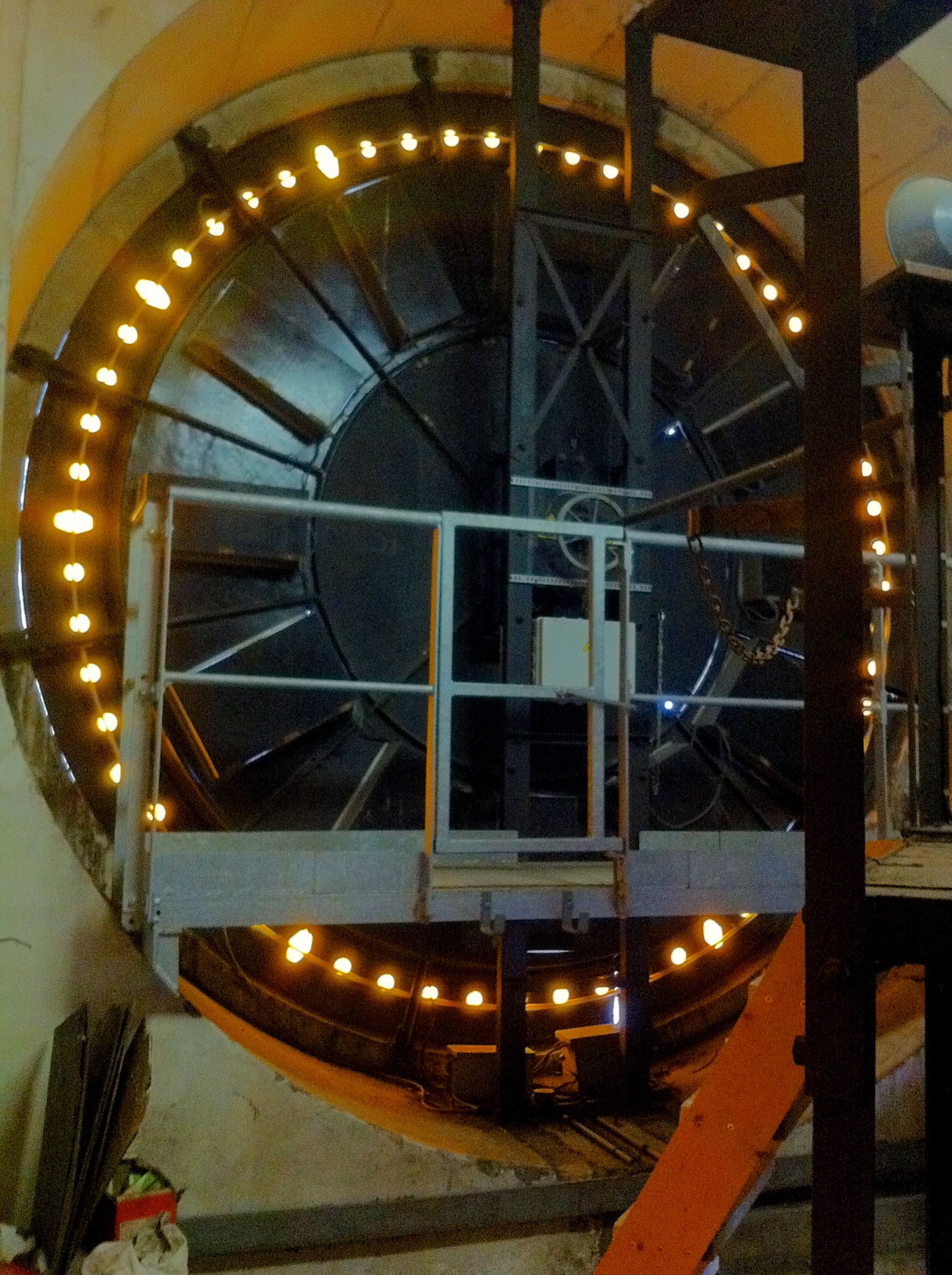 Vue arrière d'une des quatre horloges monumentales du campanile de la gare de Limoges-Bénédictins.